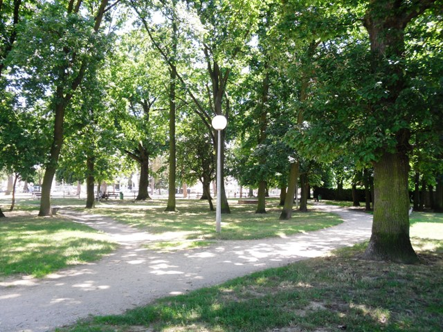 Le parc Pablo Neruda de Sainte-Geneviève-des-Bois (Essonne, Île-de-France, France).